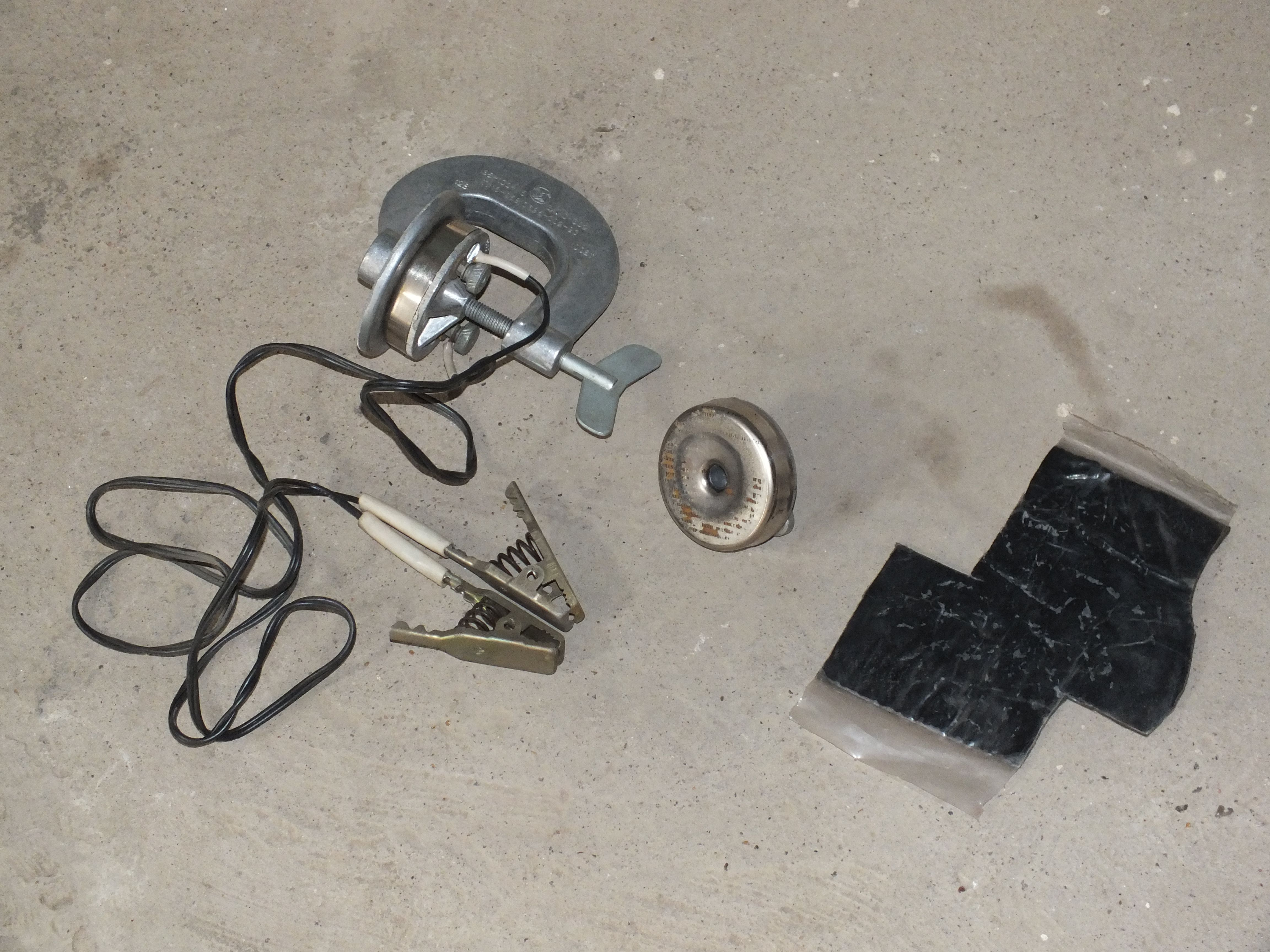 Вулканизатор